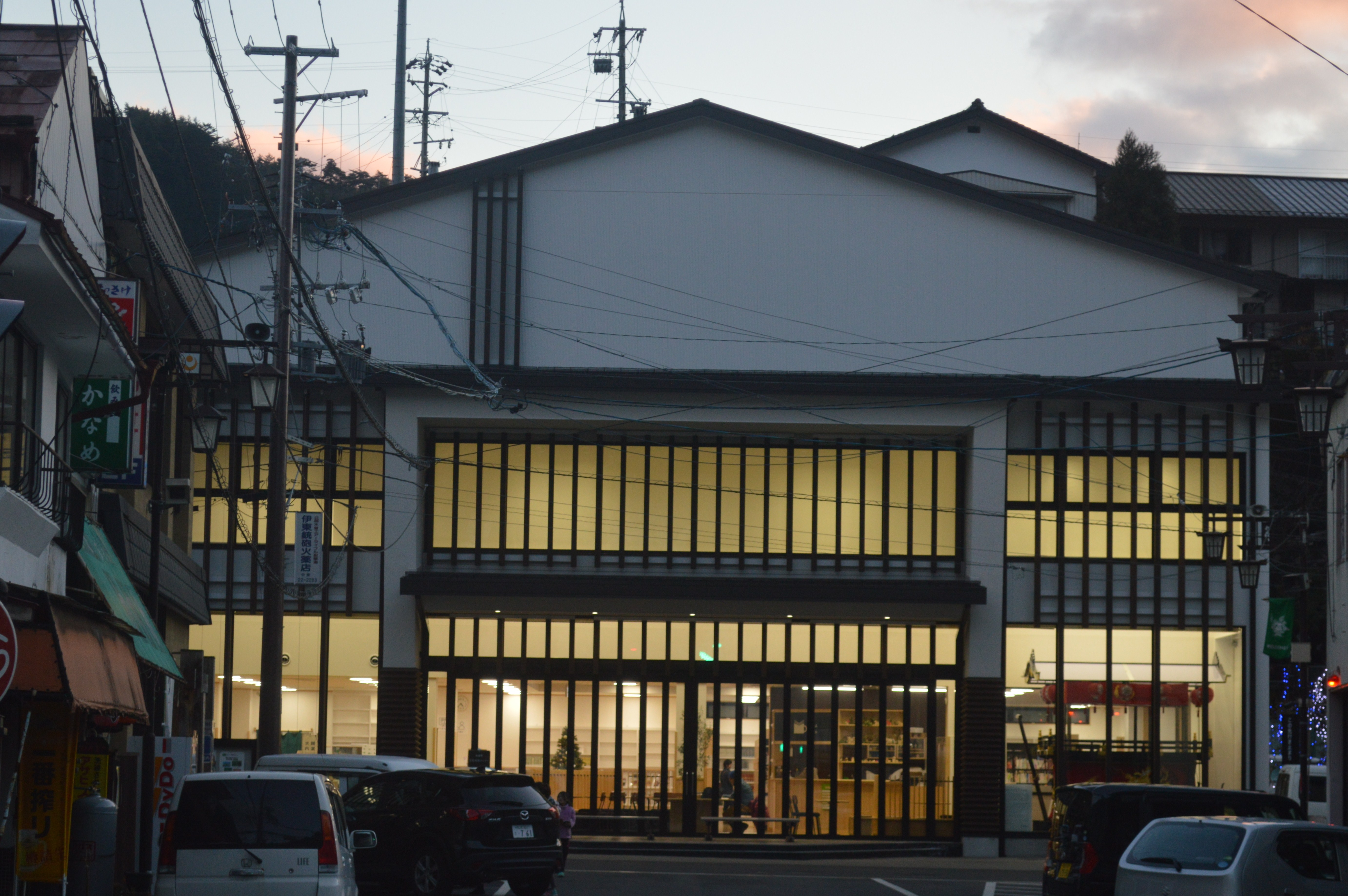 長野県木曽郡木曽町の木曽町文化交流センター。木曽町図書館を核とする。